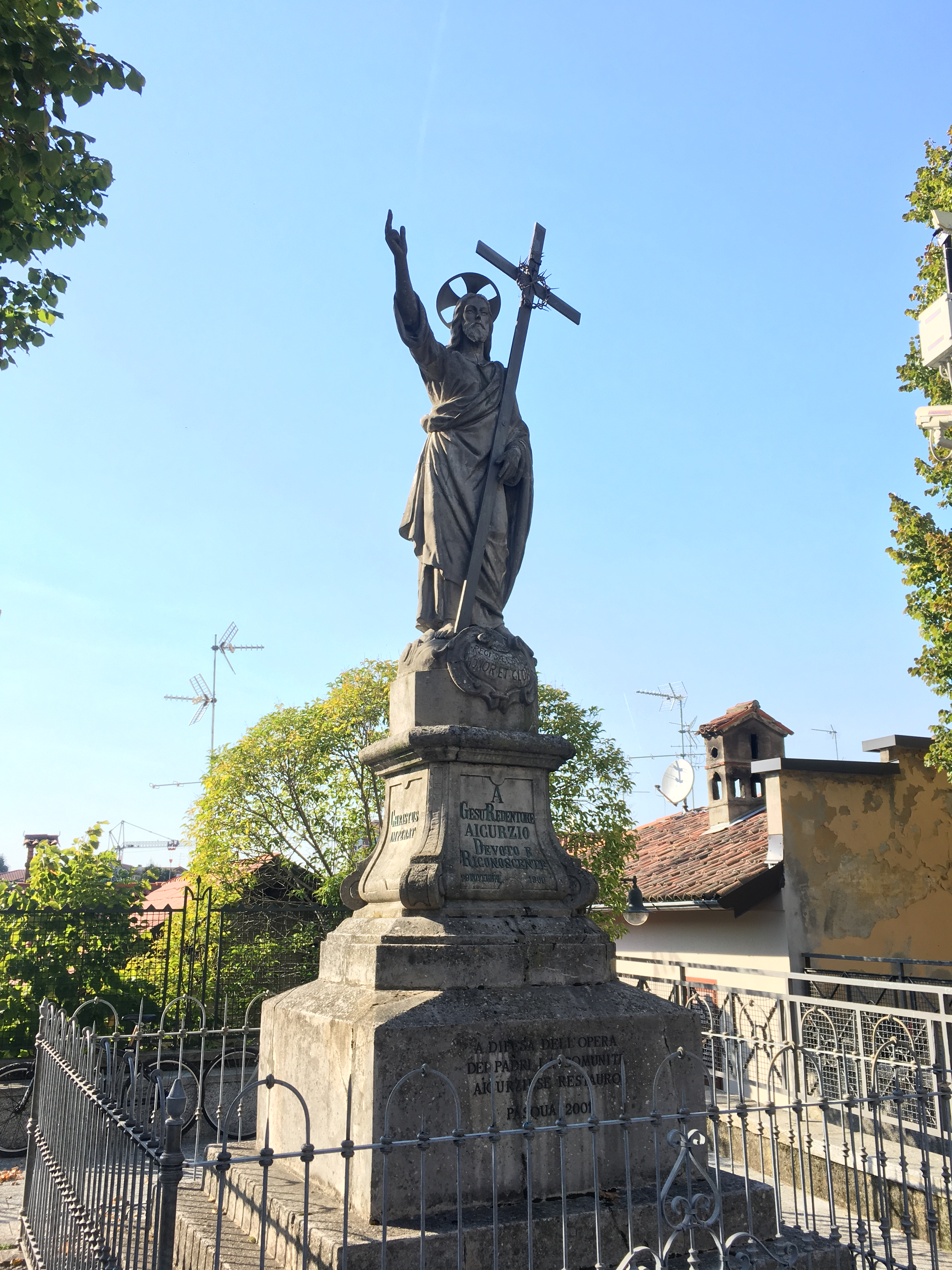 monumento al redentore This is a photo of a monument which is part of cultural heritage of Italy.